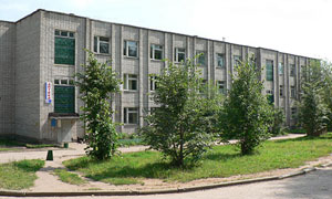 Поликлиника Кирово-Чепецкой ЦРБ